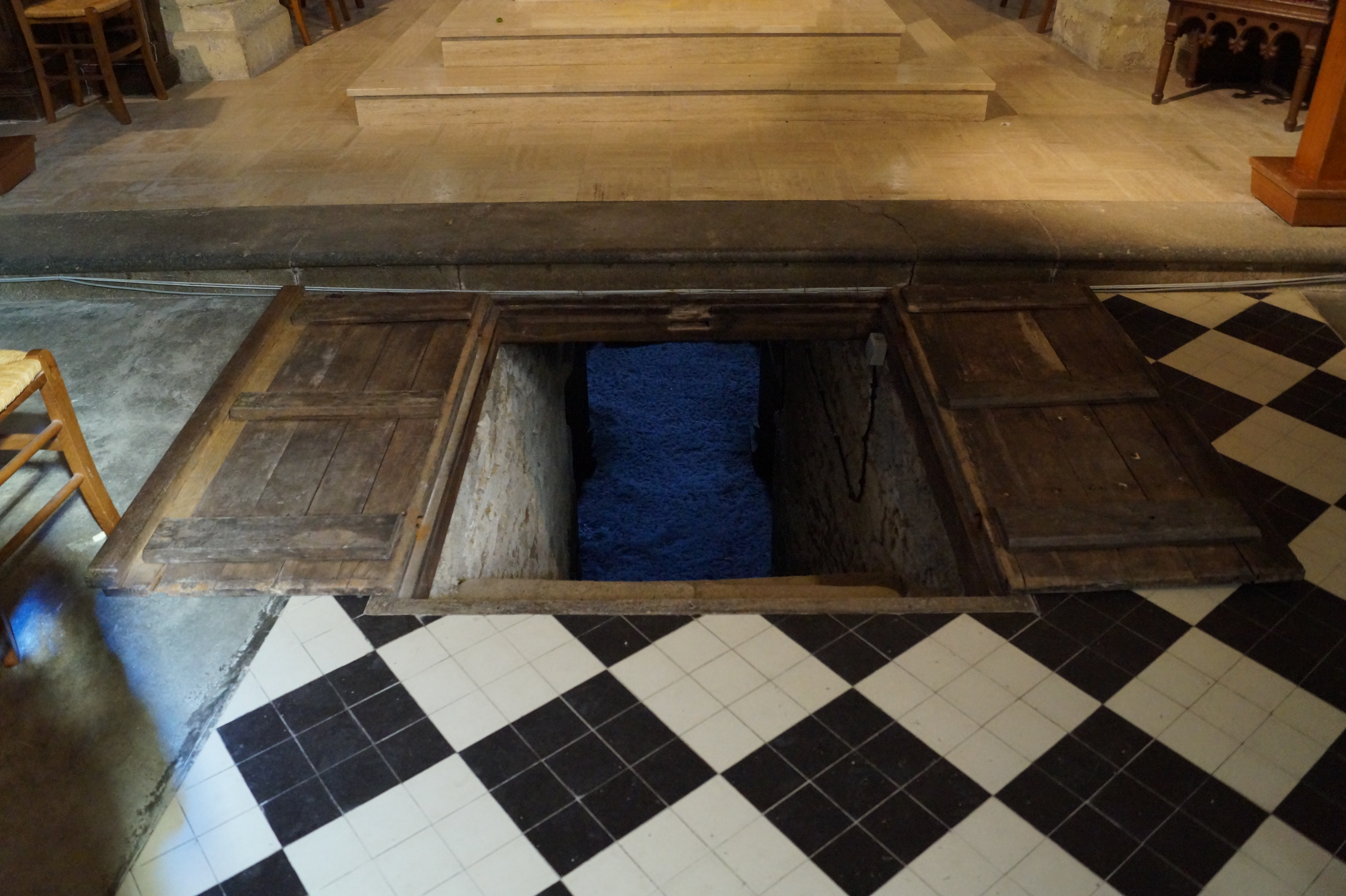 L’entrée de la crypte, à l’intérieur de l’église Saint-Romain.